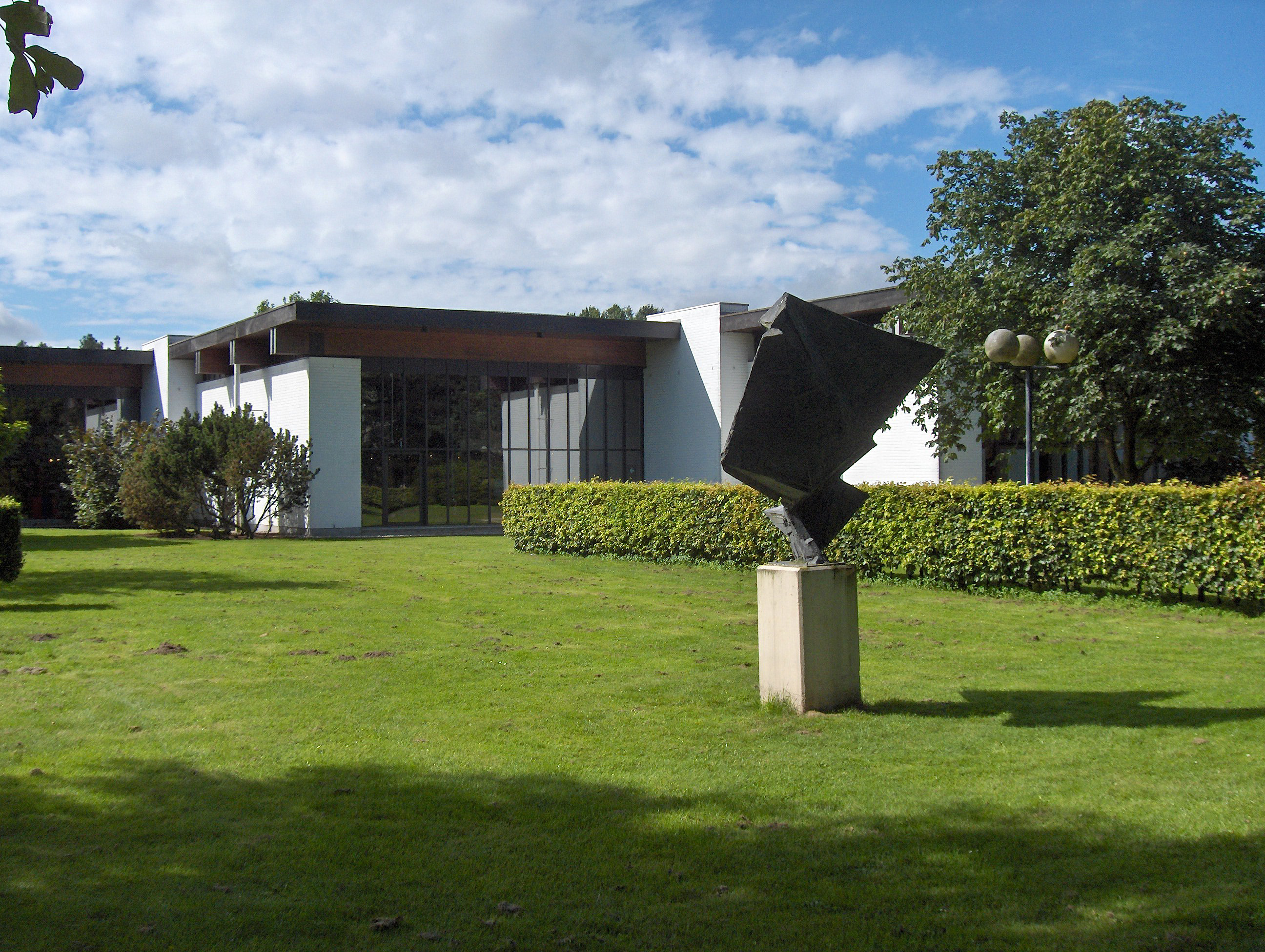 Museum van Deinze en de Leiestreek; Deinze, Belgium